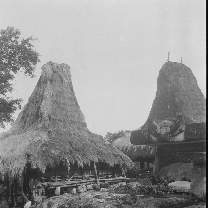 negatief. Graf en woonhuizen in een Sumbanees dorp